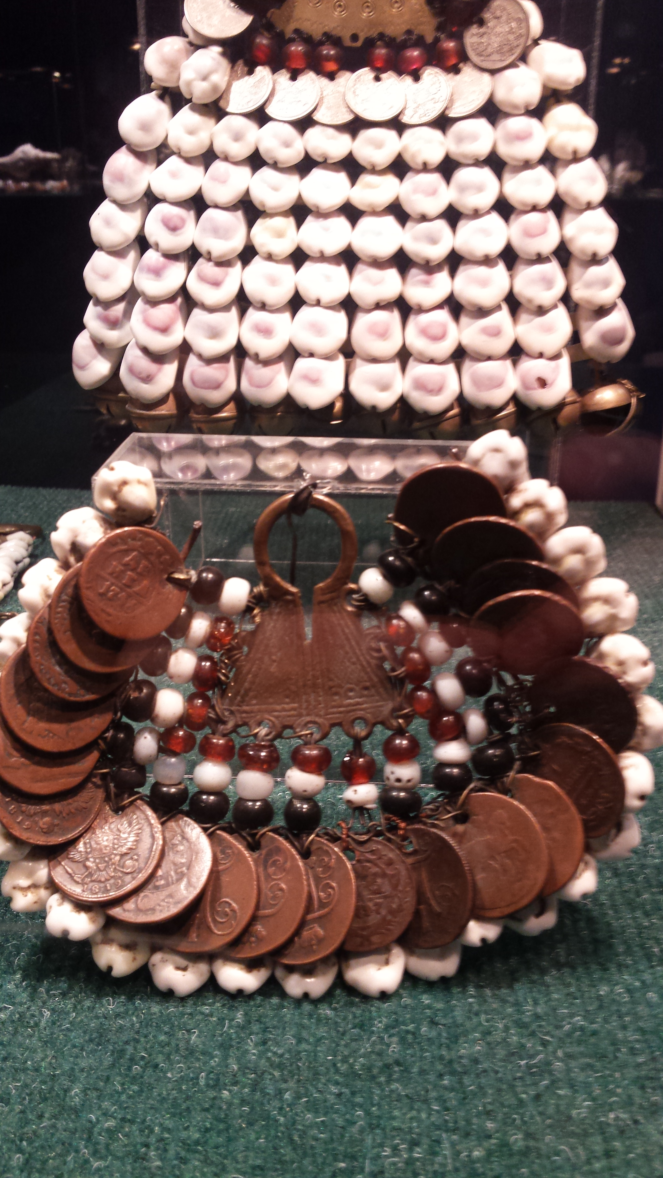 Сюлгам - серебряная женская нагрудная фибула с подвеской, Мордова-мокша, начало XX века. Фибула соединена с подвеской, состоящей из 7 рядов раковин каури, которые закреплены на конструкции из конских волос и ниток, продетых сквозь гусиные перья. Нижний ряд - медные бубенцы. Пензенская губерния, Чембарский уезд. Начало ХХ века (вверху). Сюлгам (внизу) Пензенская губерния, Наровчатовский уезд. конец XIX века. Экспонировалась на выставке "Белое, желтое, красное" в Санкт-Петербурге в январе 2019 года, в Российском этнографическом музее. This photo has been taken in the country: Russia